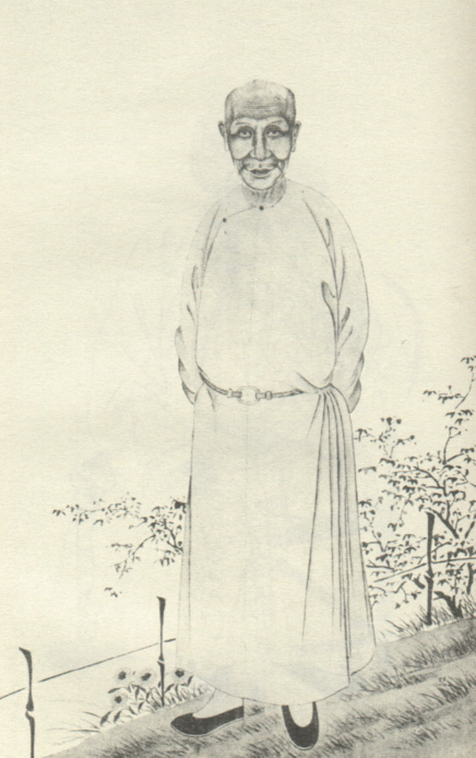 清代学者。ZHU Ciqi